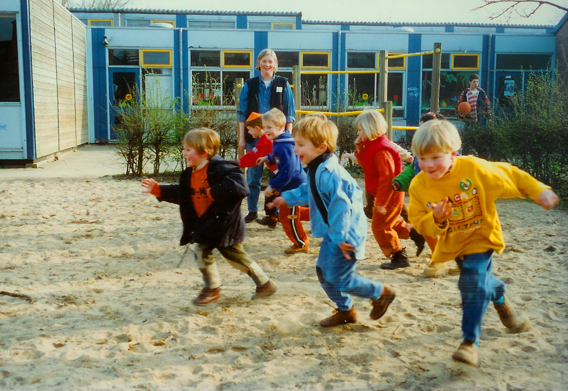 Het oude noodgebouw van de Daltonschool Rijnsweerd te Utrecht, met op de voorgrond het verjaardagsfeestje van onderstaande uploader.